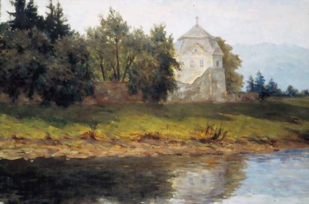 Frantz Seimetz: D'Sauer mam Iechternacher Pavillon.